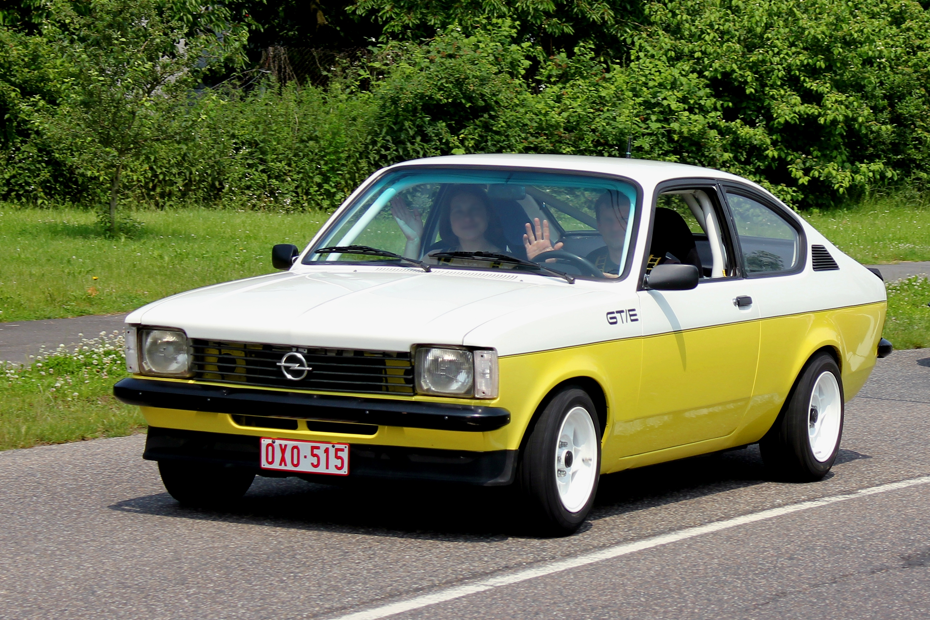 Opel Kadett GT/E, Ausführung 1977 bis 1979 (fiktives Kennzeichen)